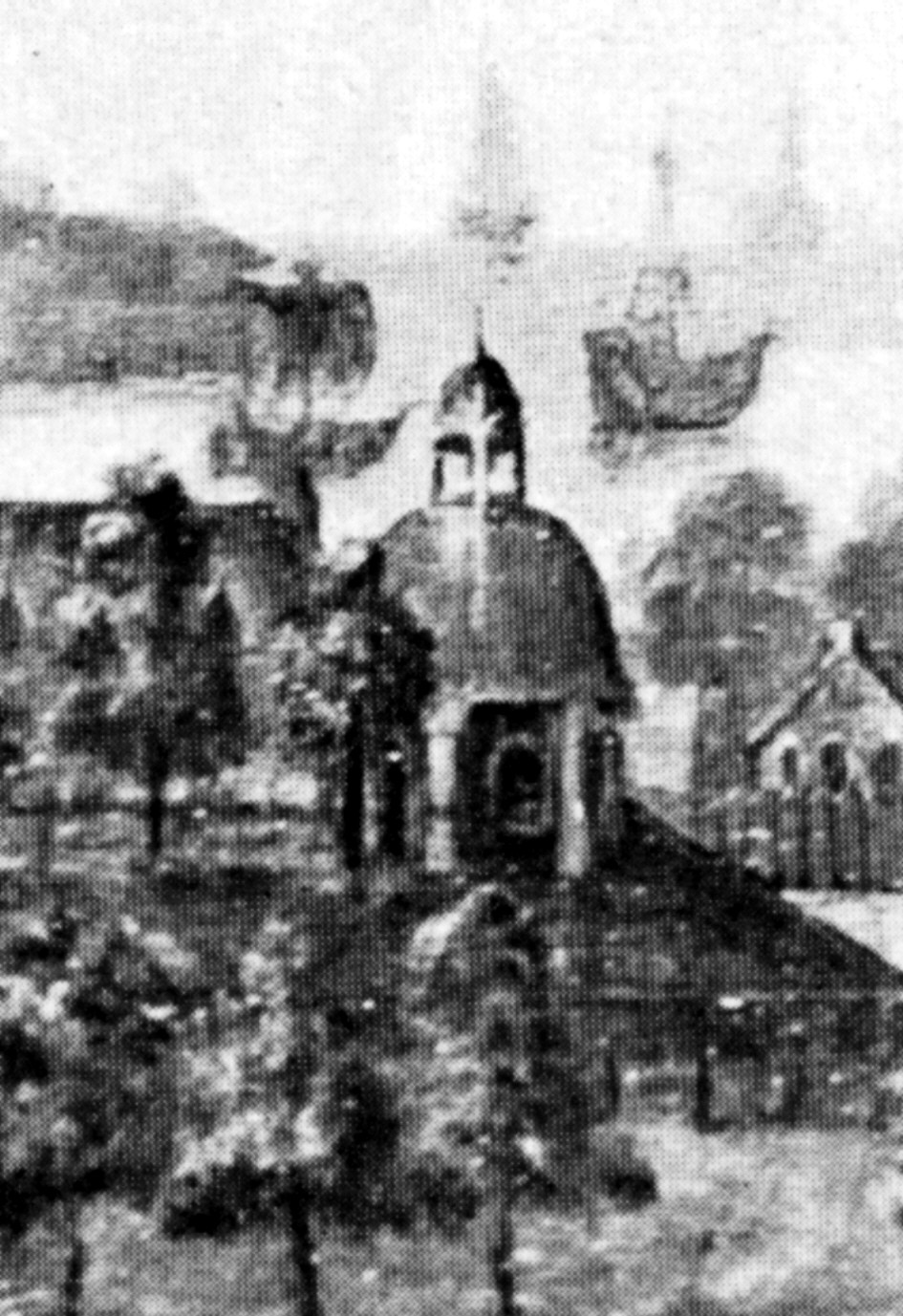 Die ehemalige St.-Gertrud-Kapelle in Lübeck. Erbaut zwischen 1350 und 1370, abgerissen 1622